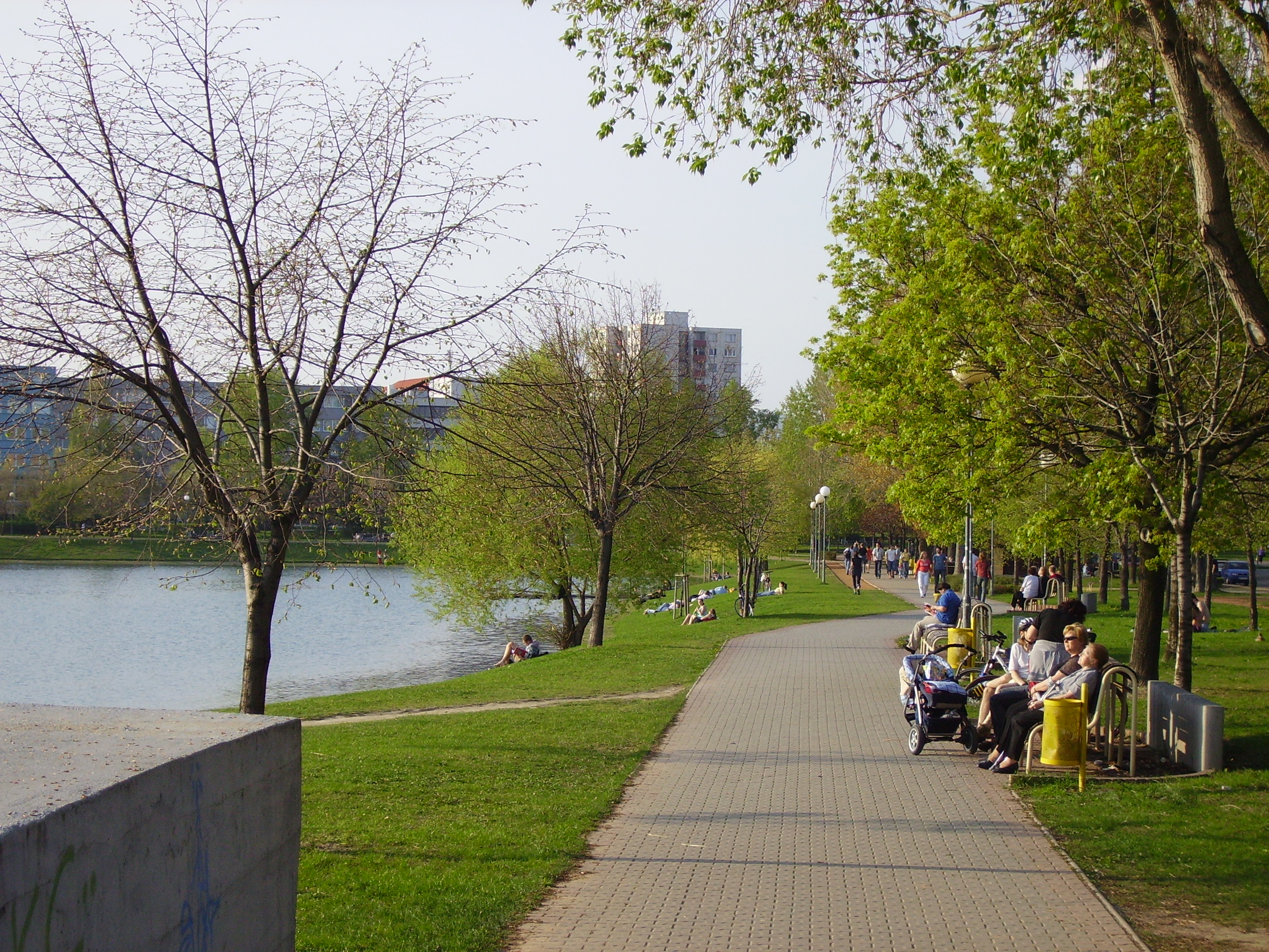 Description: Štrkovecké jazero v Bratislave (Štrkovec lake in Bratislava, Slovakia) Author: Radovan Bahna, April 2006